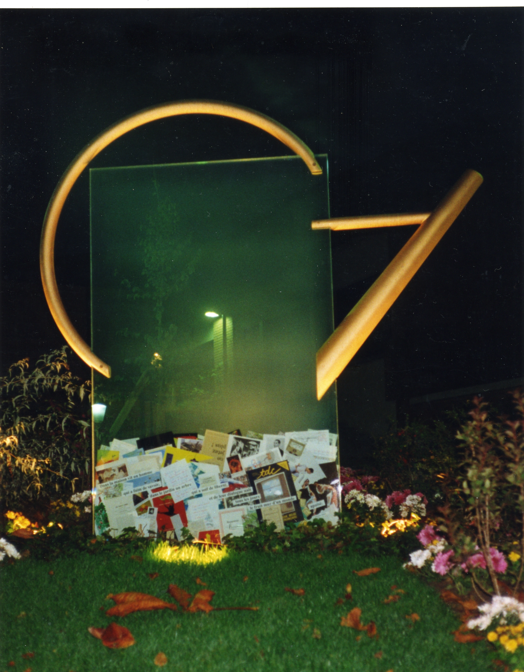 Sculpture monumentale verre laiton de 3m x 3m